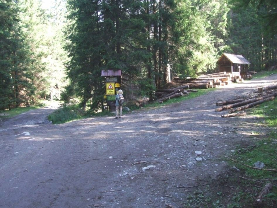 Rozdroże Niżnia Łąka {Tatry Zachodnie)